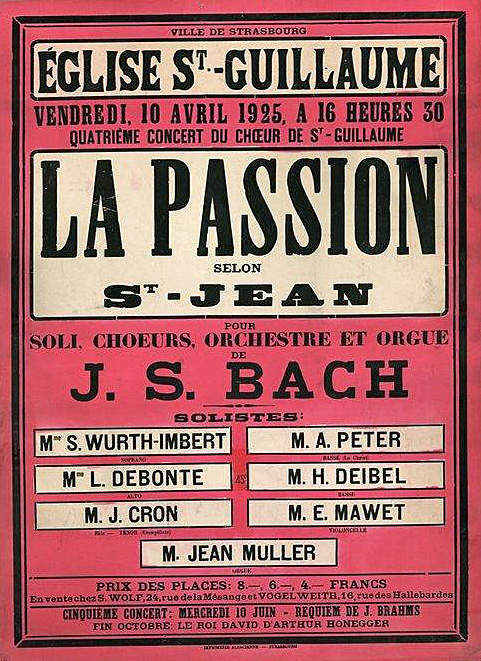 Chœur de l'Eglise Saint-Guillaume, Strasbourg. Concert, Eglise Saint-Guillaume, 10 avril 1925. 4e concert du chœur de Saint-Guillaume,la Passion selon Saint Jean de J.S. Bach. Solistes : S. Wurth-Imbert, L. Debonte. J.Cron (Bâle), A. Peter (et al.) ; Dir. : Fritz Munch. Affiche. Bibliothèque nationale et universitaire de Strasbourg.